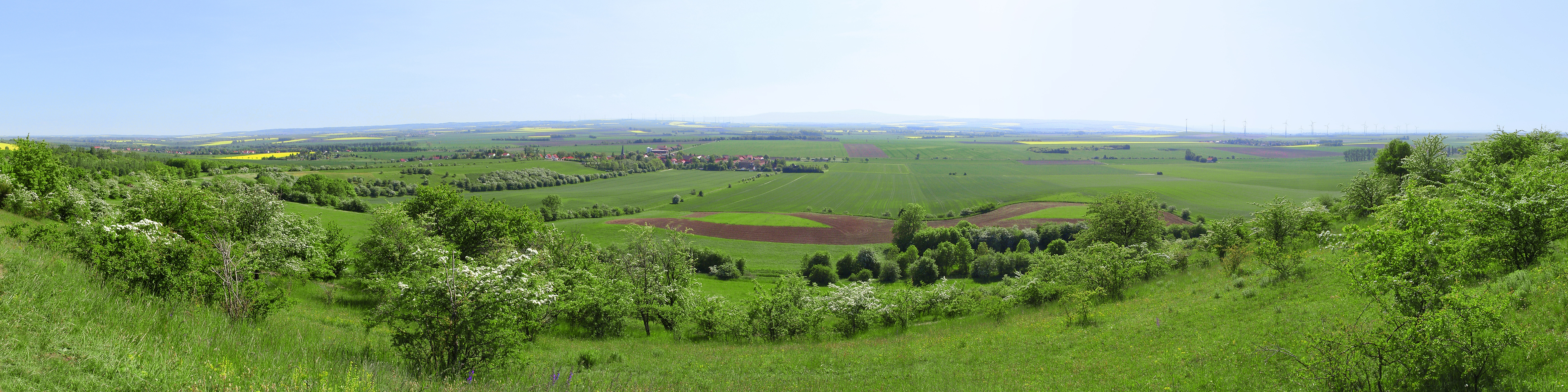 Blick vom Heeseberg in Richtung Harz (der Brocken etwa in der Bildmitte), am Fuß der Anhöhe die Gemeinde Beierstedt; im Vordergrund NSG „Heeseberg“ und dann LSG „Heeseberg“ Standort: 52°4′59.34″N 10°51′30.64″E / 52.08315°N 10.8585111°E